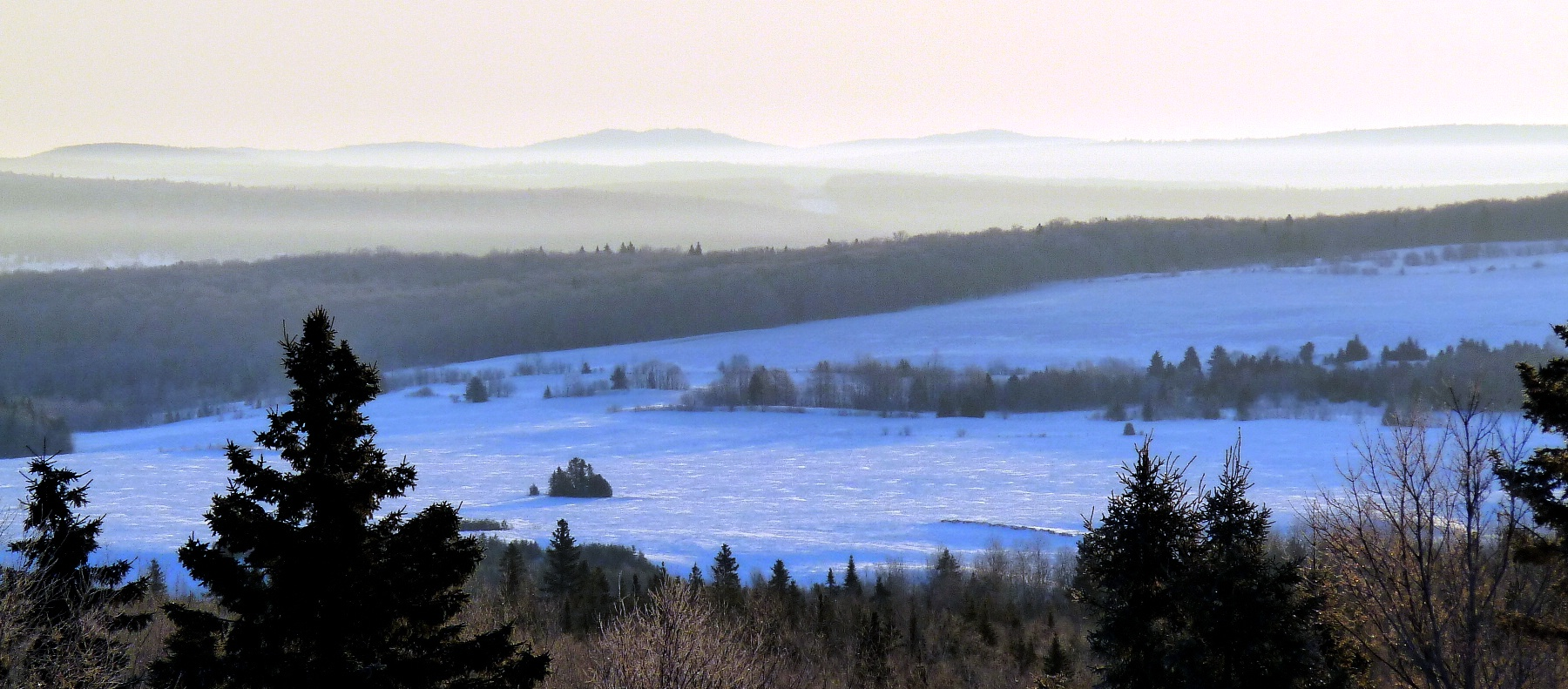 Paysage rural de saint-Cyprien au Bas-Saint-Laurent (Québec) vu à partir du chemin Taché